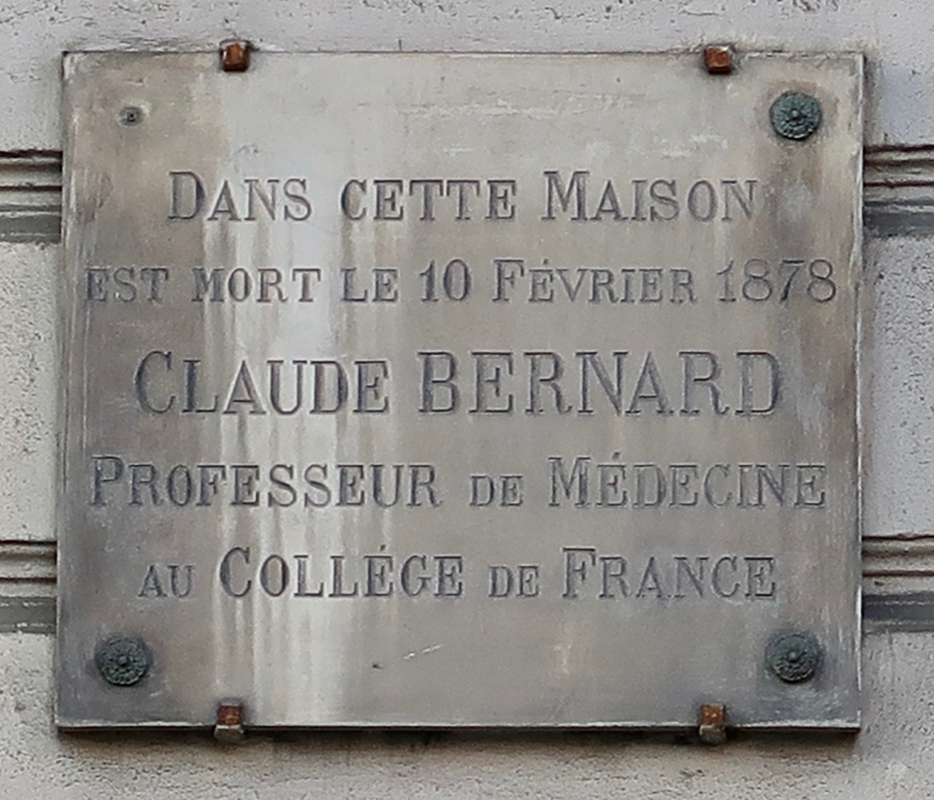 Plaque en hommage à Claude Bernard, 40 rue des Écoles (Paris, 5e).